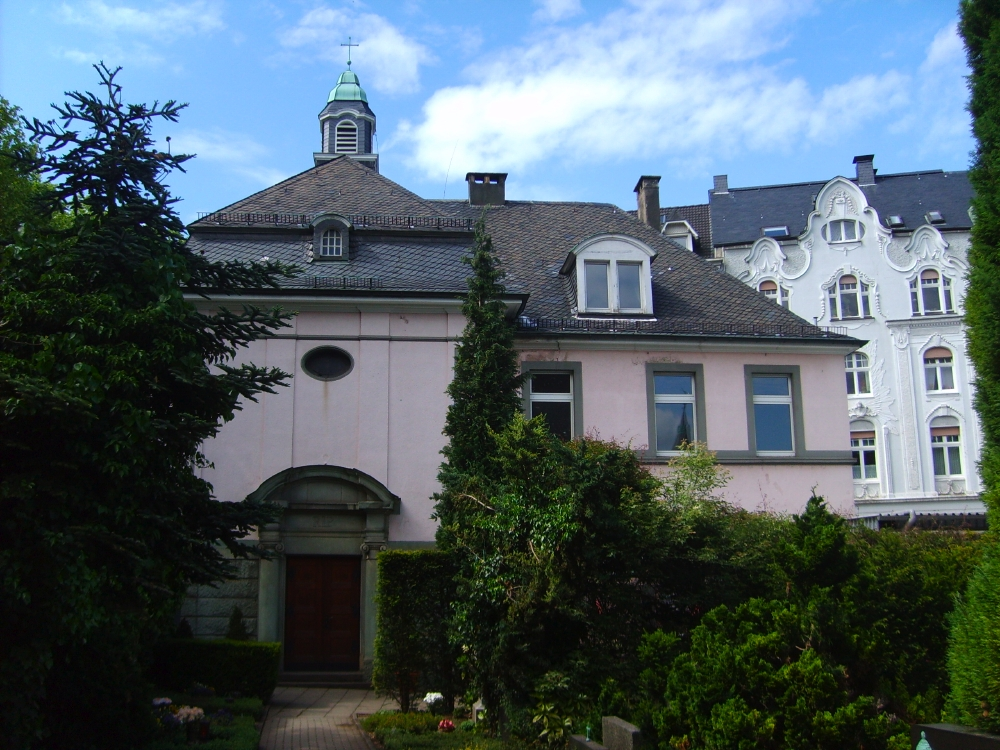 Friedhofskapelle des katholischen Friedhofs an der Hochstraße, Wuppertal-Barmen, Germany